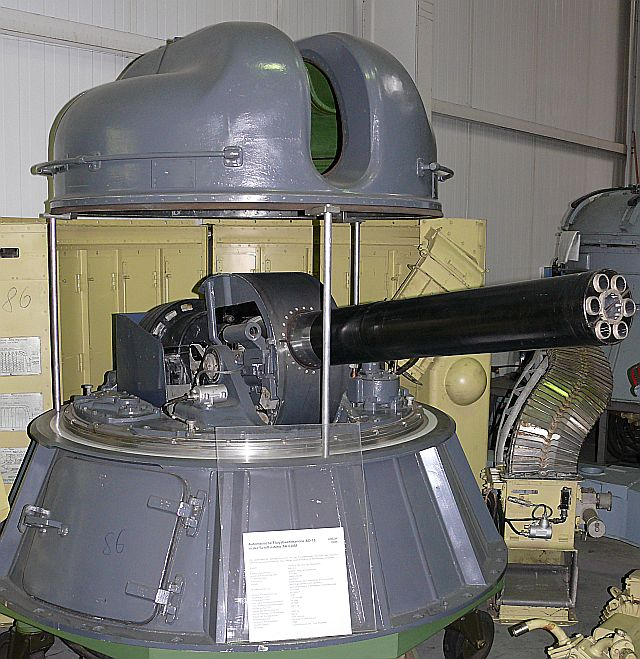 Grjasew-Schipunow GSch-6-30, eigenes Bild